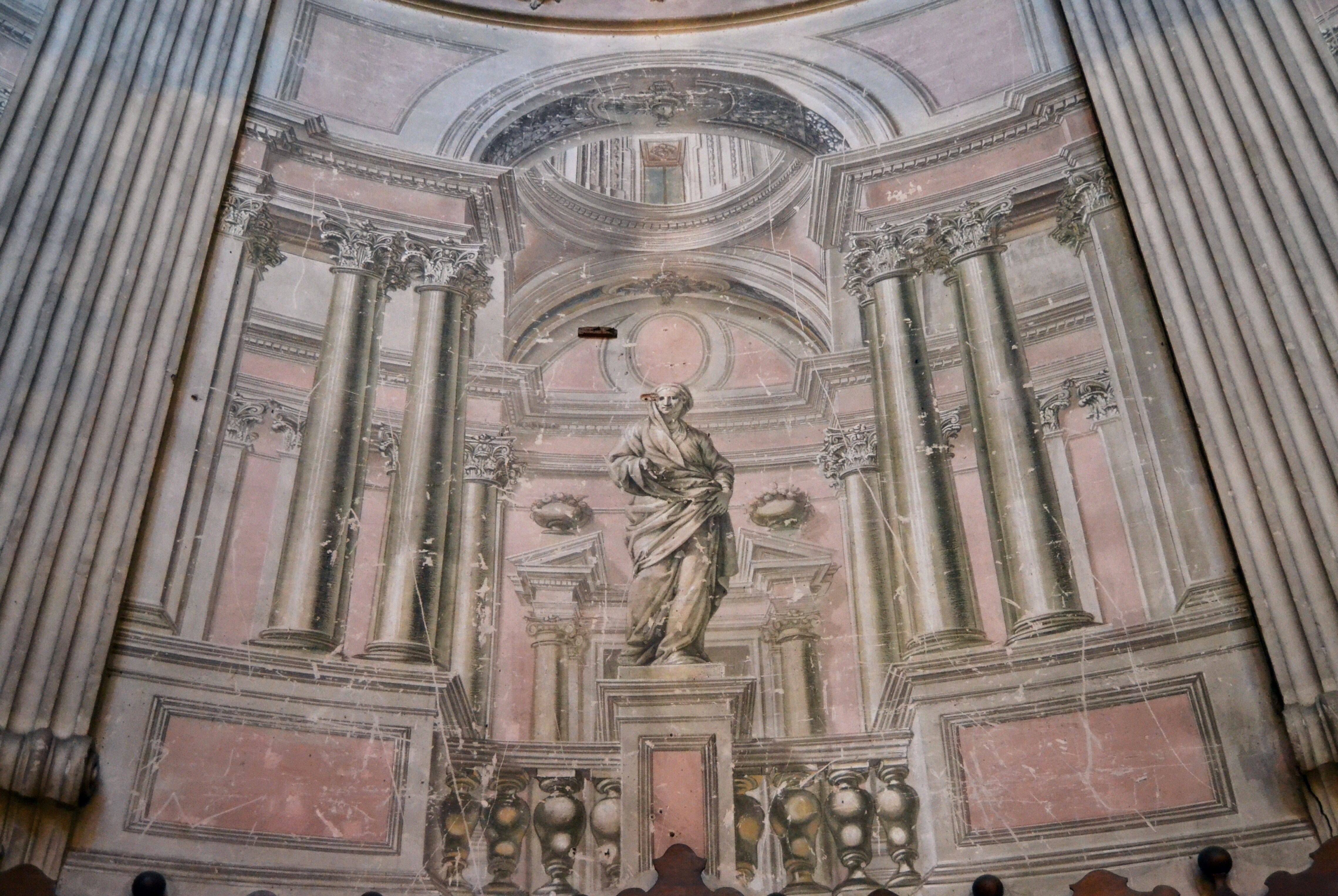 Decoració amb perspectives fingides a l'àbsis de l'església del Temple de València. Obra de Filippo Fontana (1744-1800).